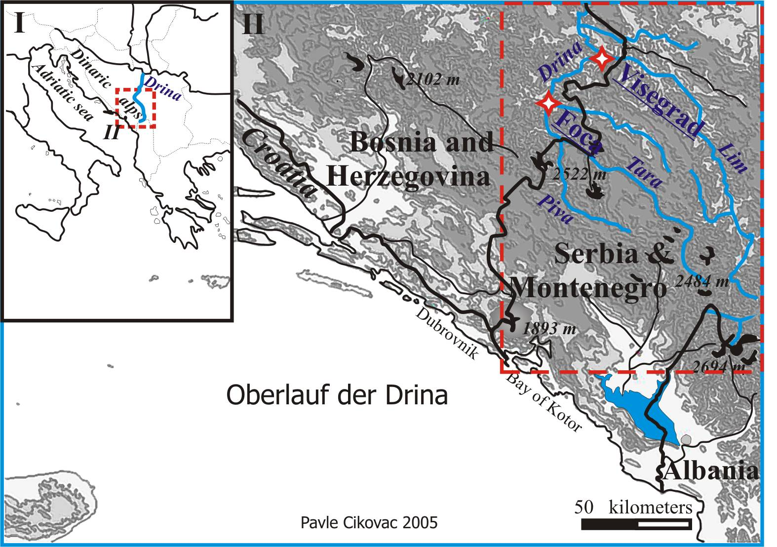 Übersichtskarte Oberlauf der Drina